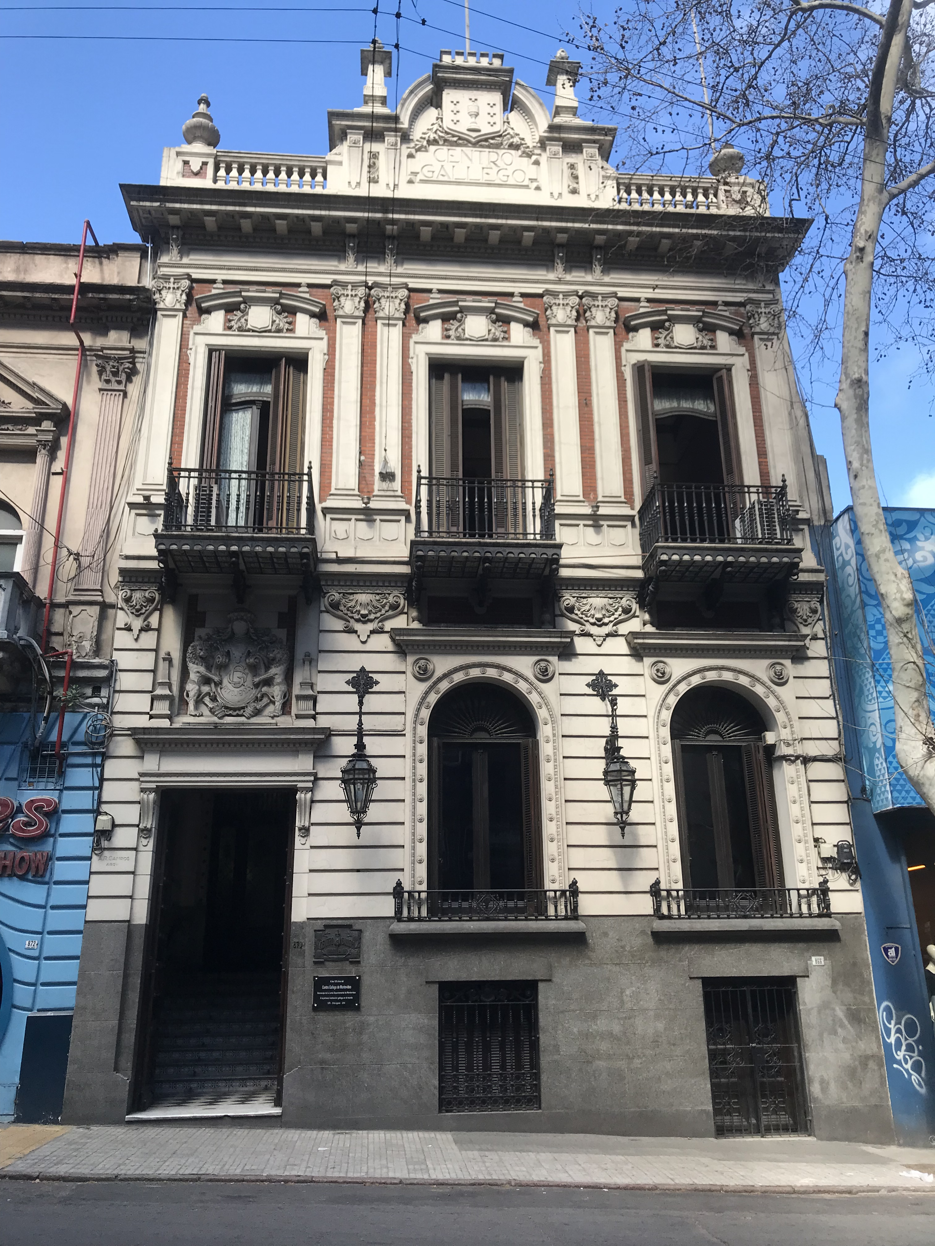 Centro Gallego de Montevideo en 2019